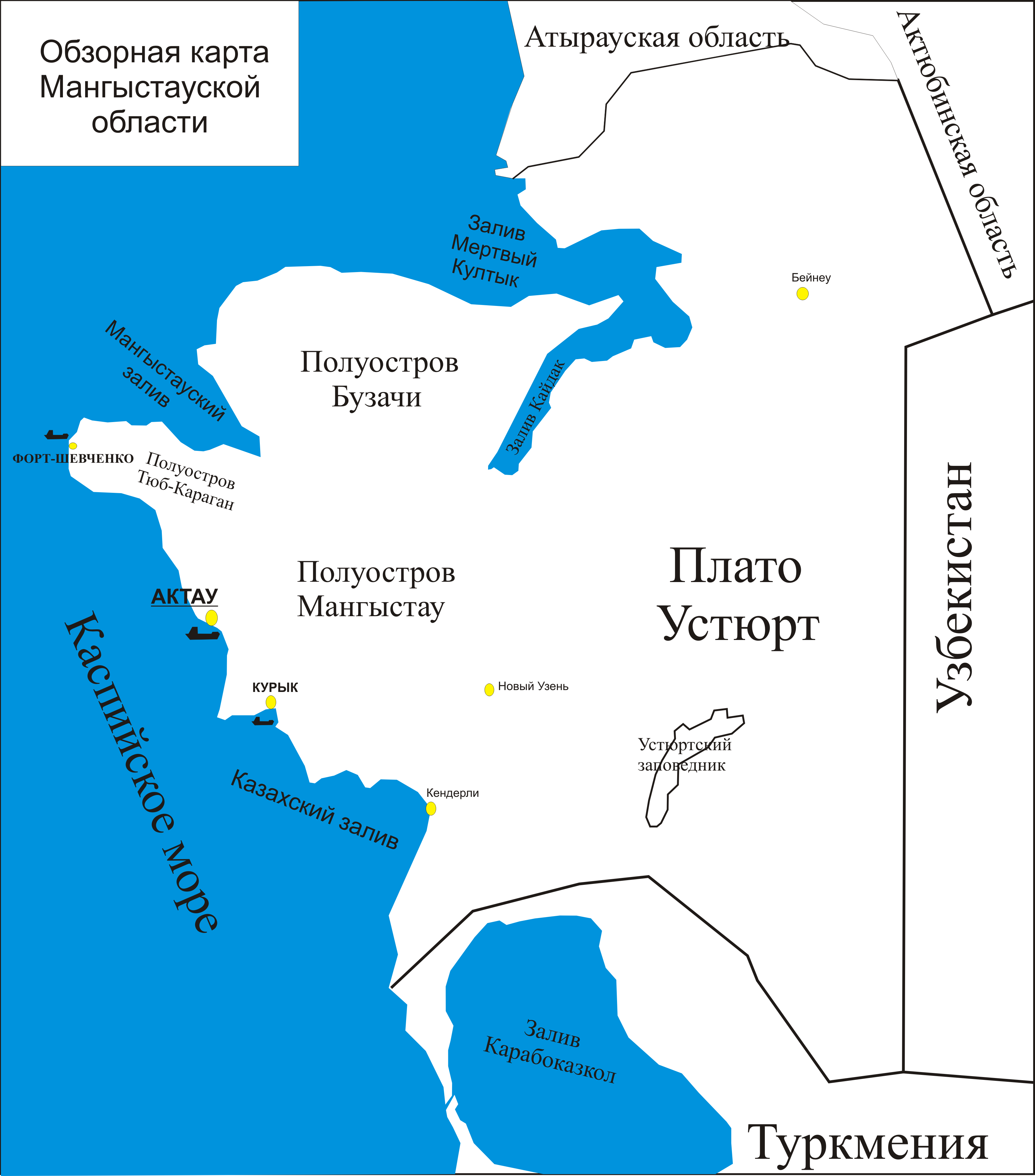 Маңғыстау облысының шолу картасы